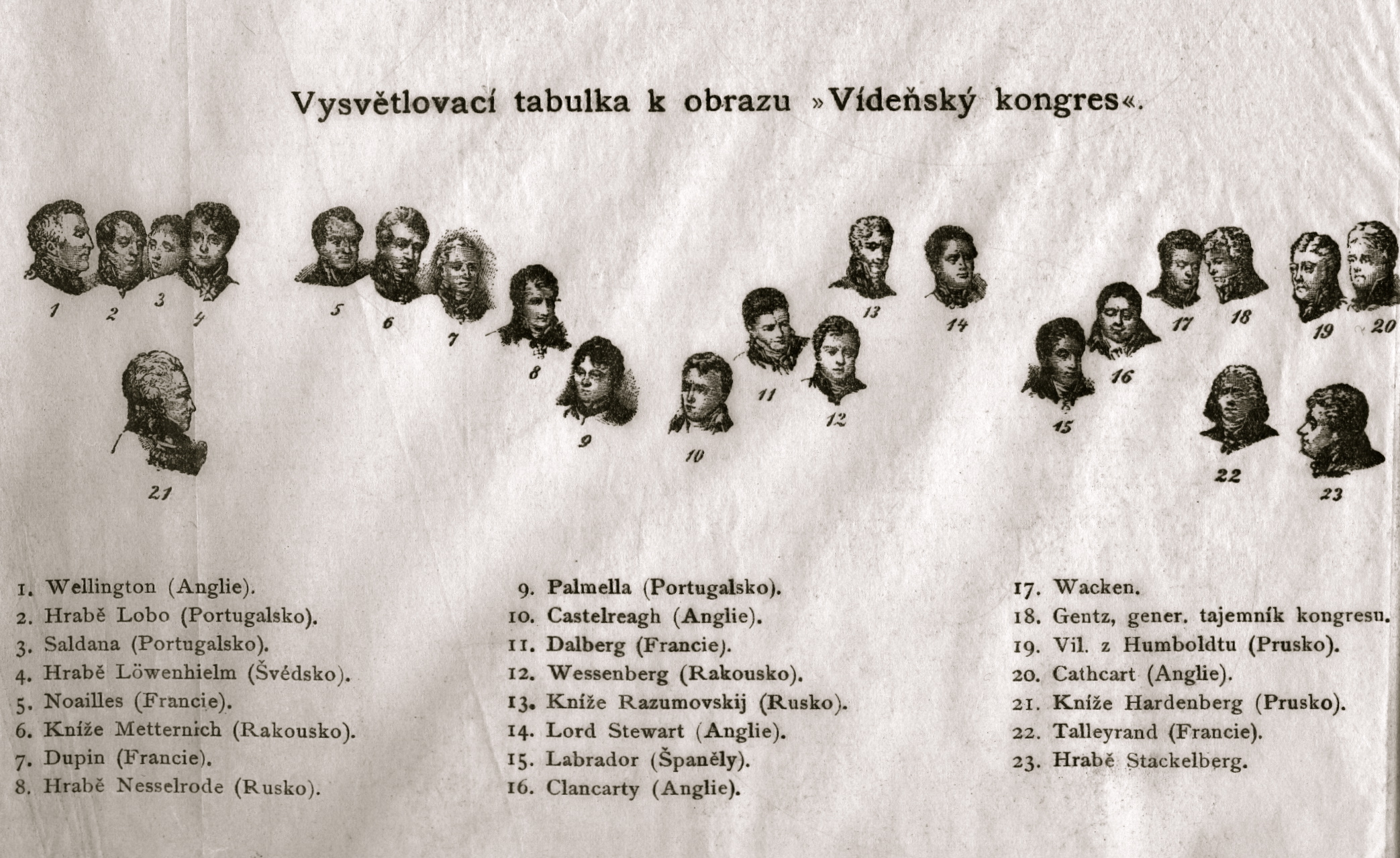 Identifikace osob účastníků Vídeňské konference 1814 na kresbě Jana B. Isabeyse